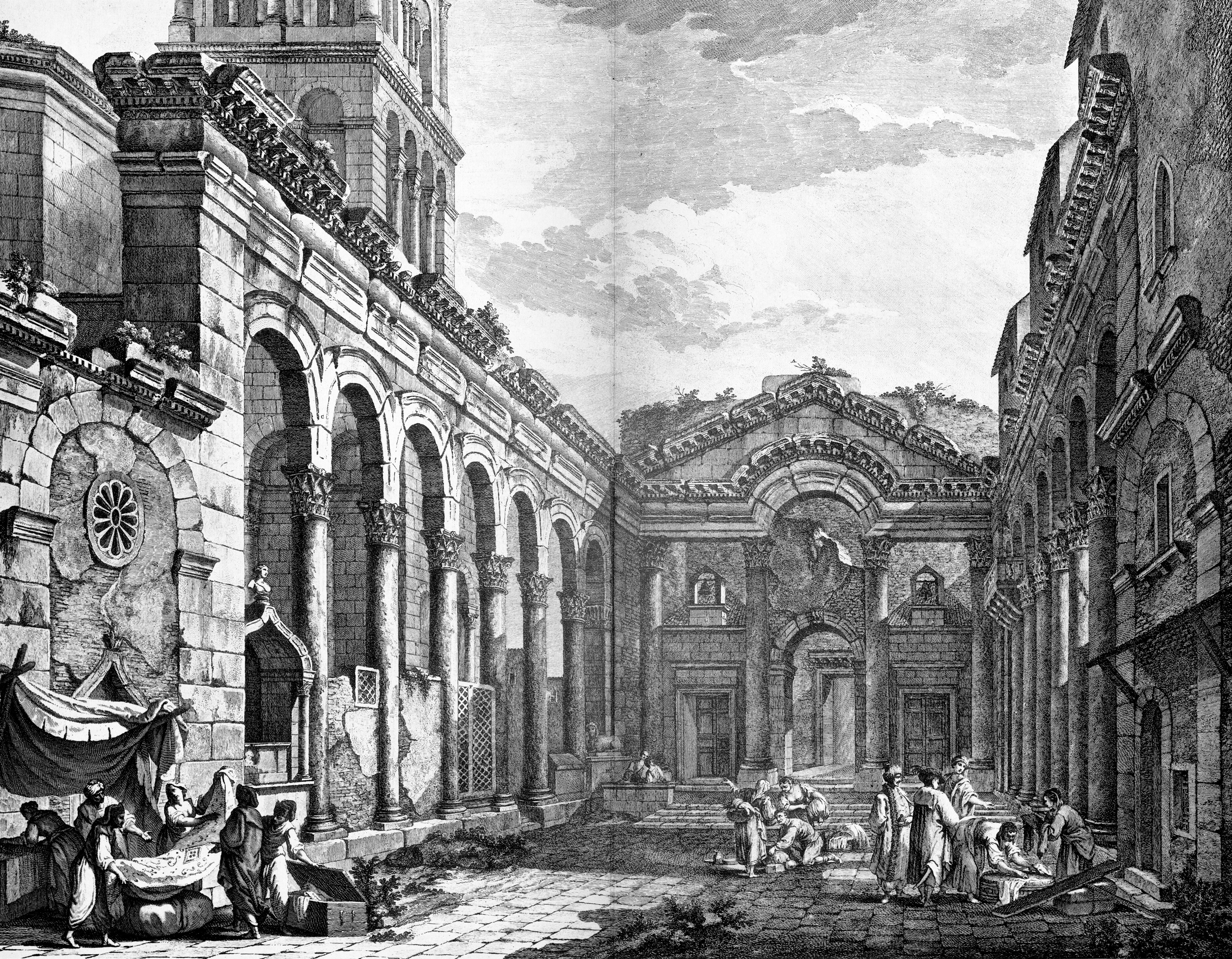 Denkmäler der Kunst in Dalmatien, Herausgegeben von Georg Kowalczyk, mit einer Einleitung von Cornelius Gurlitt. 132 Lichtdrucktafeln nach Naturaufnahmen des Herausgebers Georg Kowalczyk sowie nach Kupfern aus dem Werke von Robert Adam: Ruins of the Palace of the Emperor Diocletian at Split, 1764 Wien, 1910, Verlag von Franz Malota